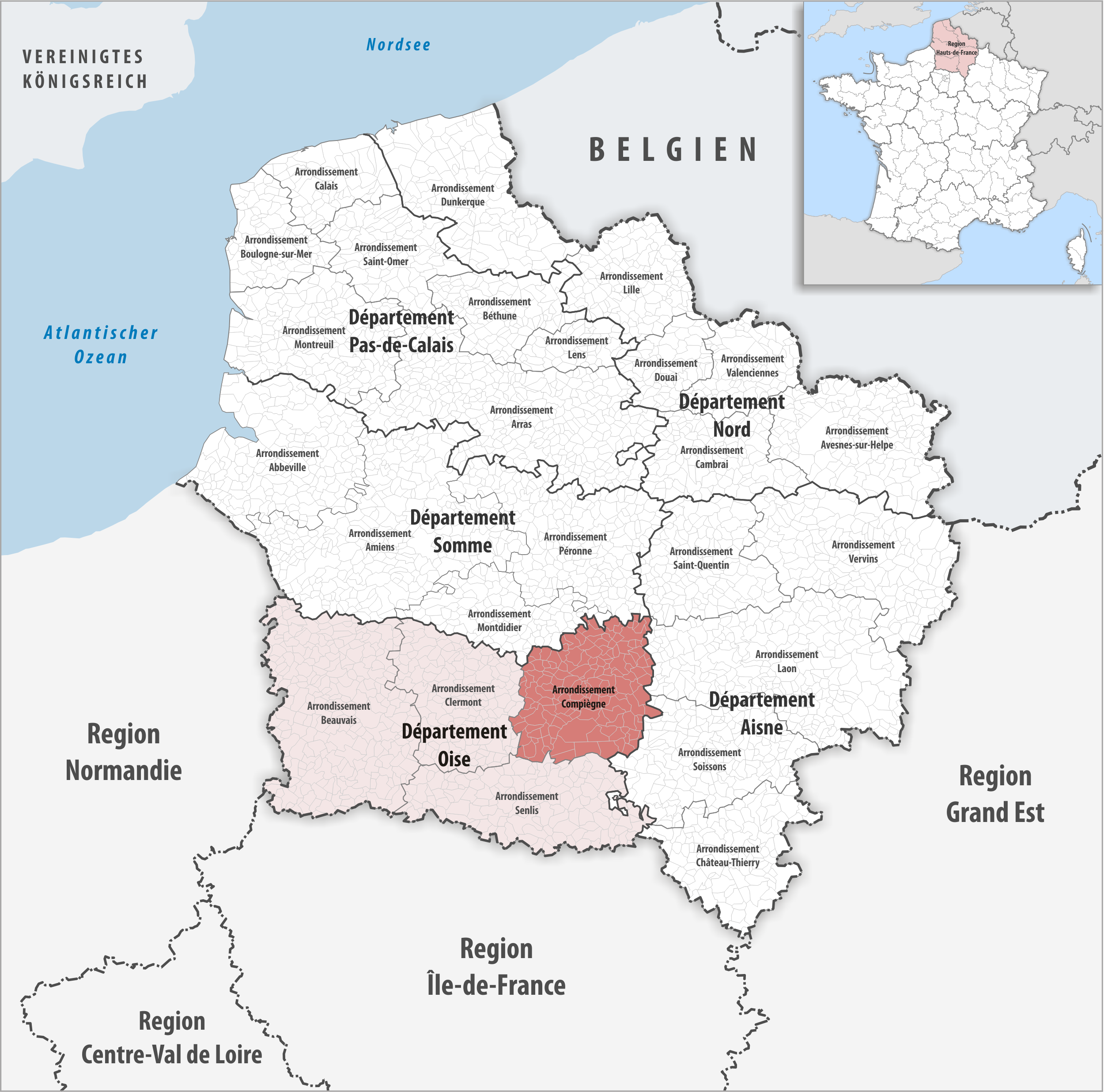 Lage des Arrondissements Compiègne